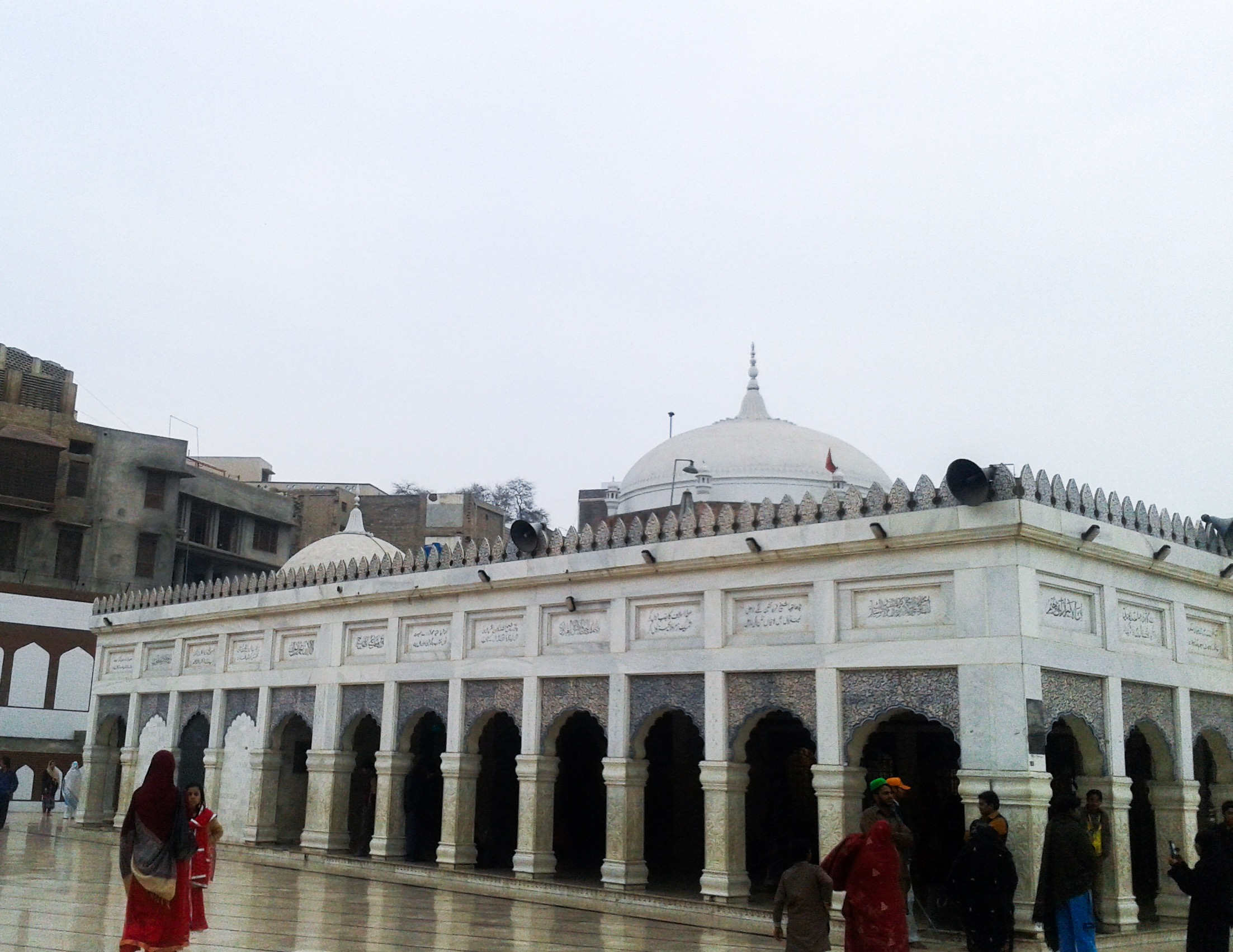 Darbar Hazrat Baba Farid ud Deen Ganj Shakar Rahmatullah Alaih